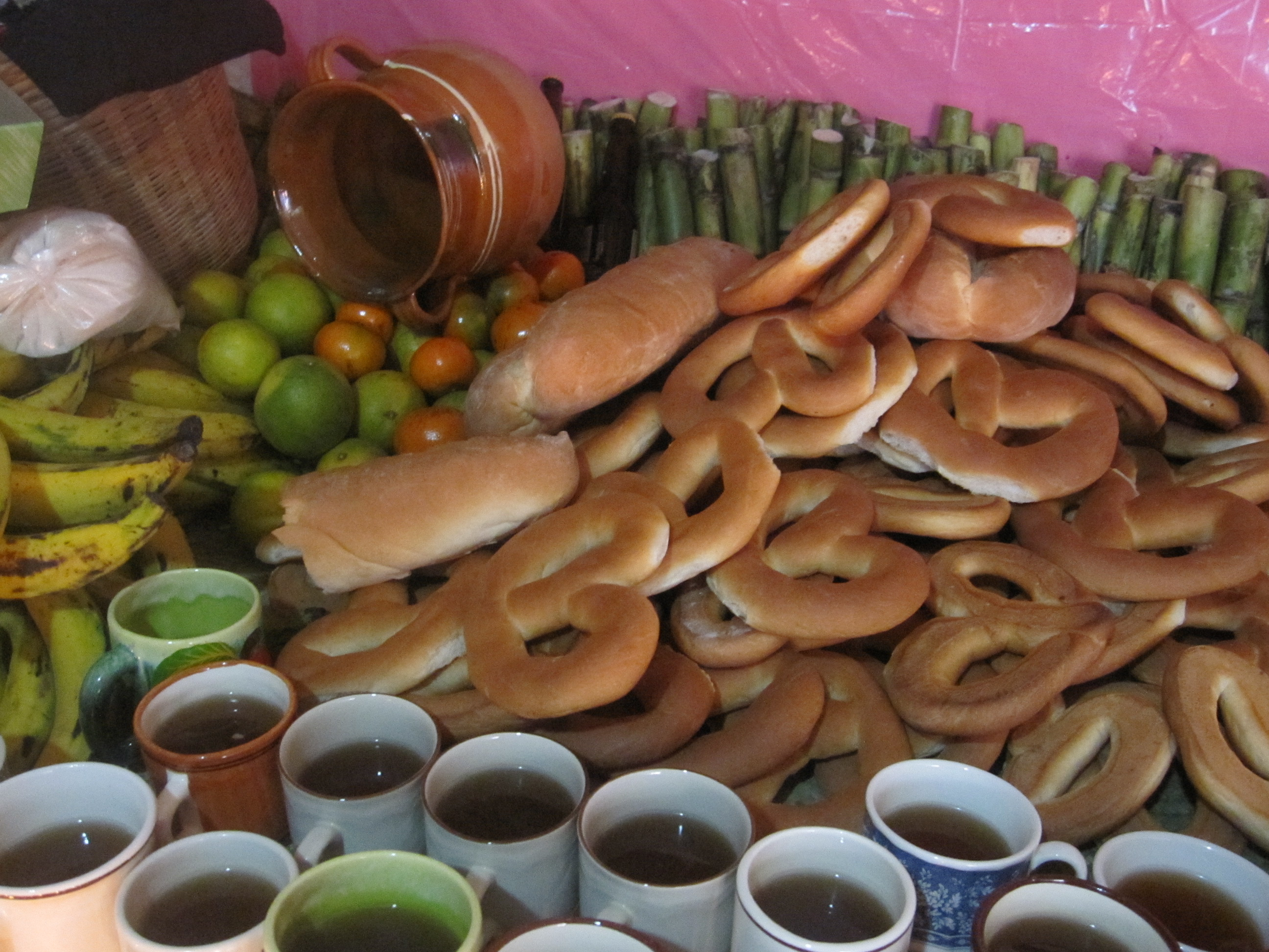 El pan cruzado es un pan casi exclusivo de los pueblos y comunidades de Acaxochitlán, y se usa en diversas ceremonias y festividades. Es un pan de trigo de sabor semidulce y color dorado, con forma parecida a la de un corazón o unos anteojos. En la festividad indígena del día de muertos, la gente coloca el pan cruzado de manera indiscriminada sobre el altar, ya sea acomodado uno sobre otro o en pequeños pantles; también colocan dos o tres piezas sobre cada taza o cajete de café o chocolate. En algunas ofrendas el pan es colgado en los muros o en las vigas del techado de la casa, y en casos muy excepcionales, sobre los arcos de flores que realizan algunas personas. Algunos vecinos del municipio comentan que este pan representa las canillas (huesos) de los difuntos. Para el investigador Marco Buenrostro Hernández, representa los huesos de la cadera y por tanto es un símbolo de fertilidad.